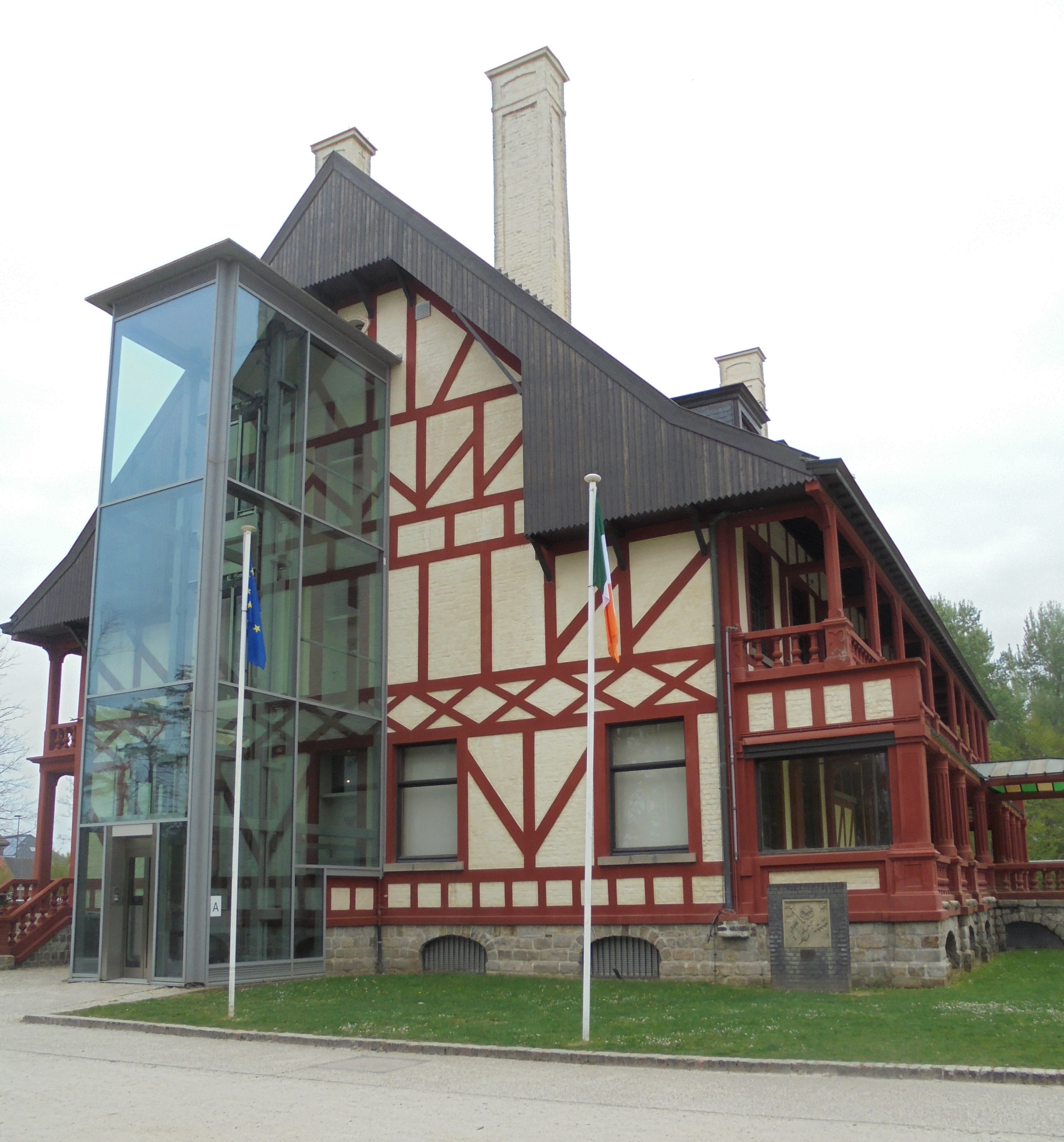 De linkse zijgevel met lift van het Kasteel van Zonnebeke - Ieperstraat - Zonnebeke - West-Vlaanderen - België